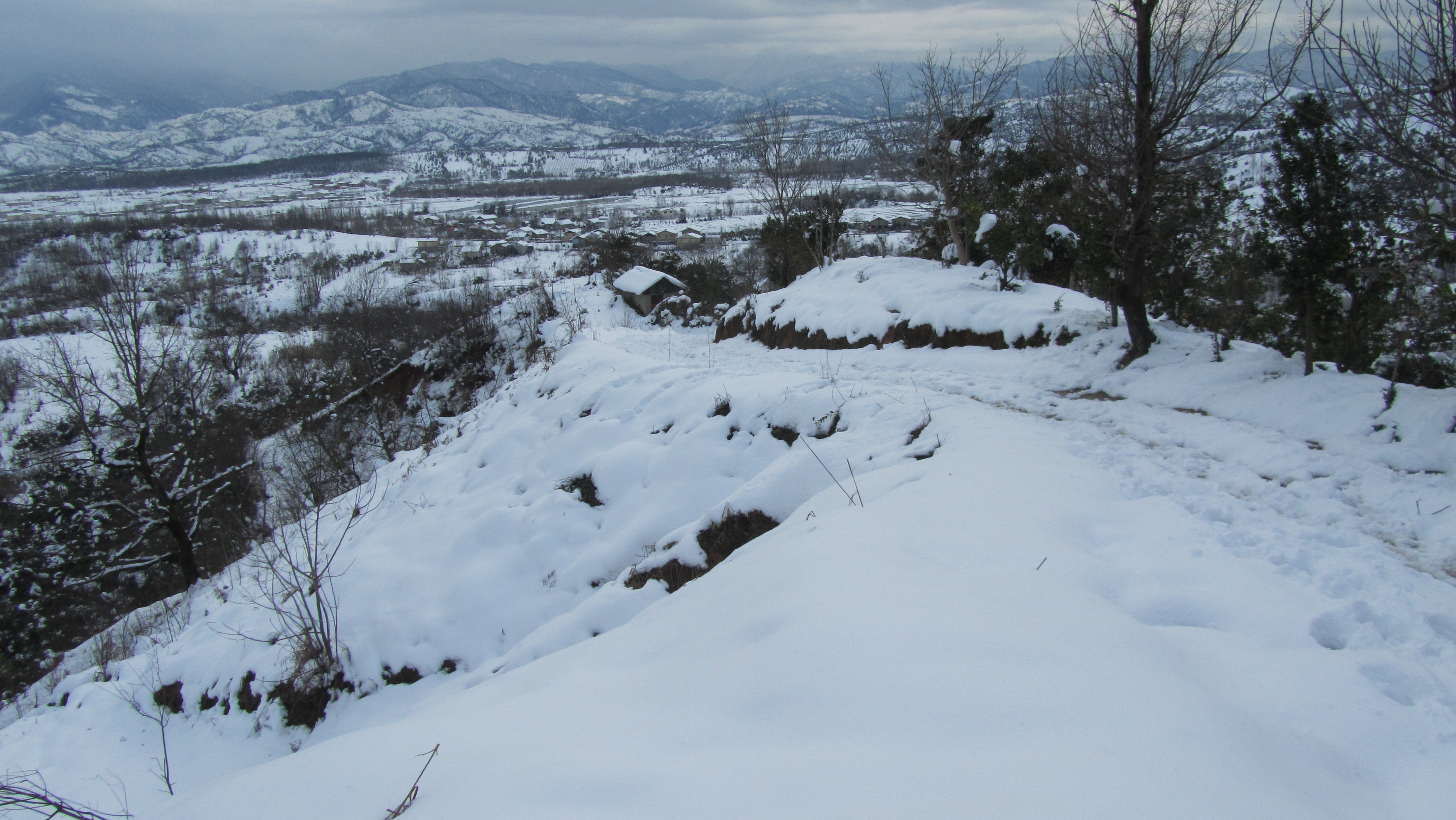 برف زیبا